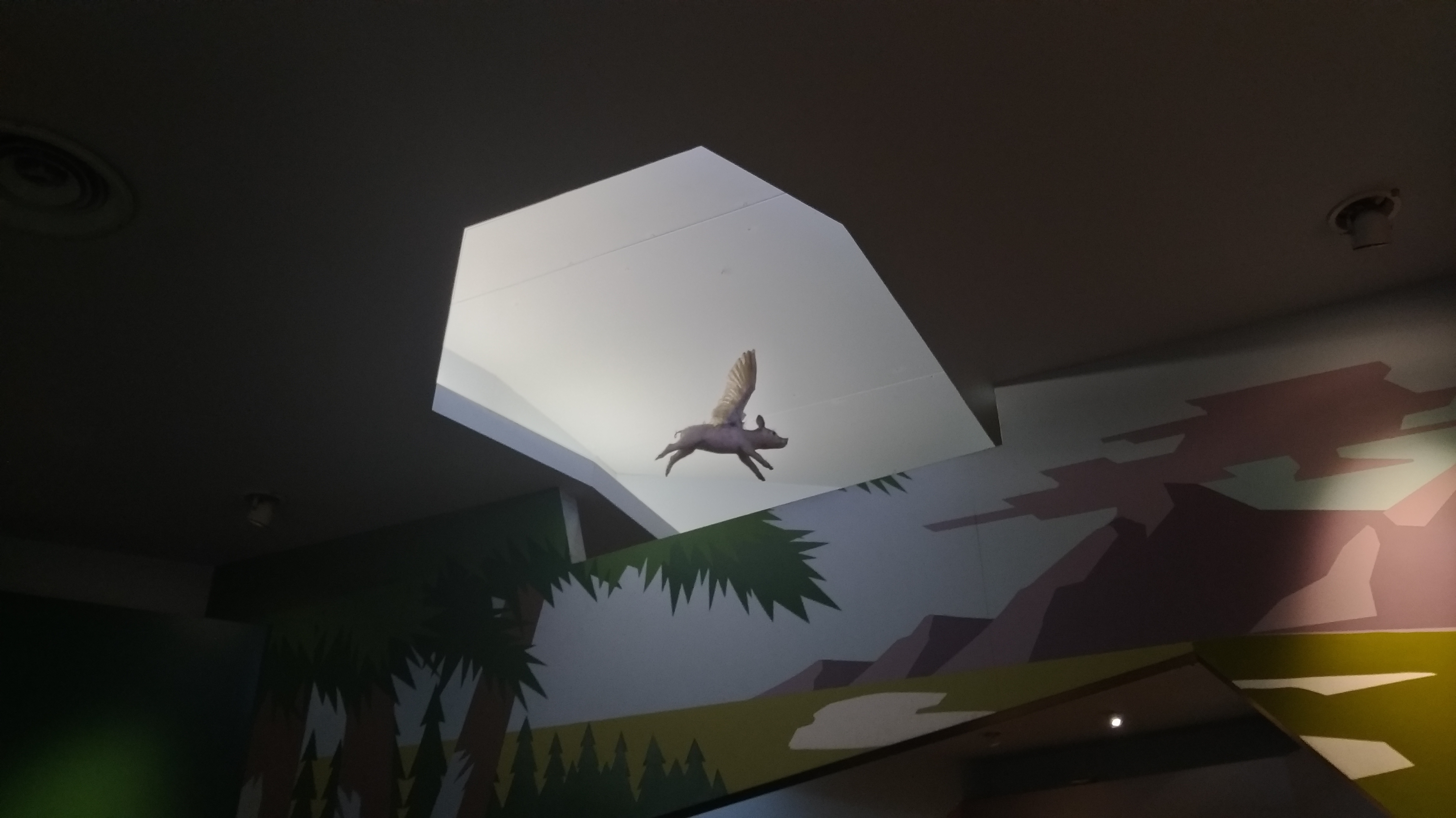 中文（台灣）: 中華民國國立自然科學博物館的飛天豬模型